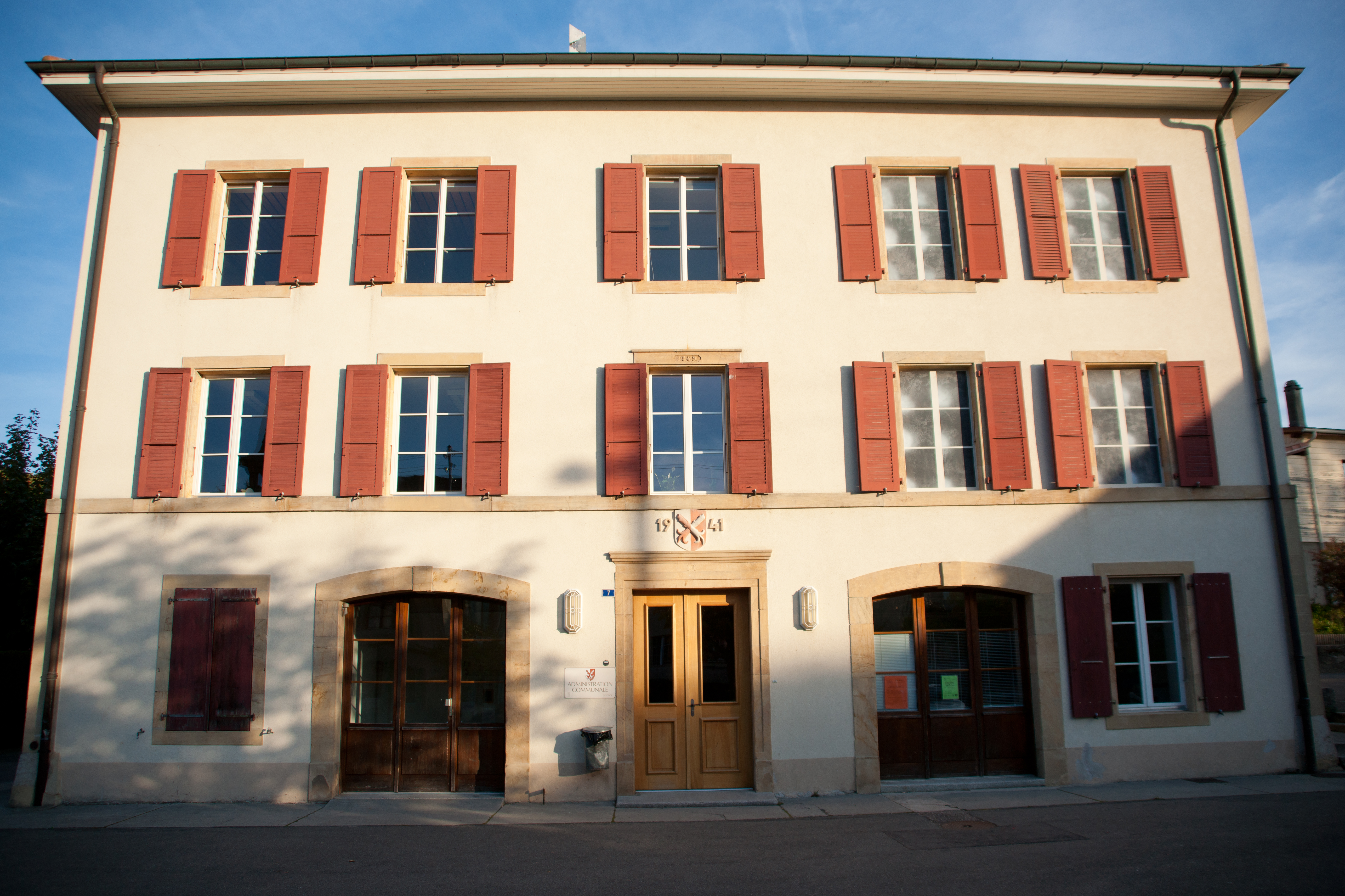 Maison de commune d'Essertines-sur-Yverdon, canton de Vaud, Suisse.